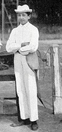 André Vacherot Champion de France de lawn-tennis en 1897.